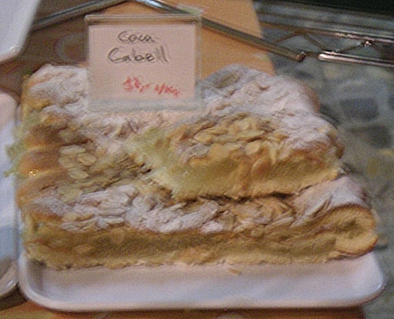 Coca de cabell d'àngel